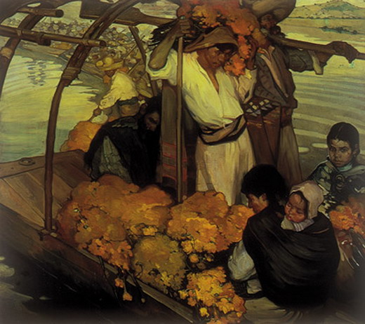 картина Сатурніно Герран